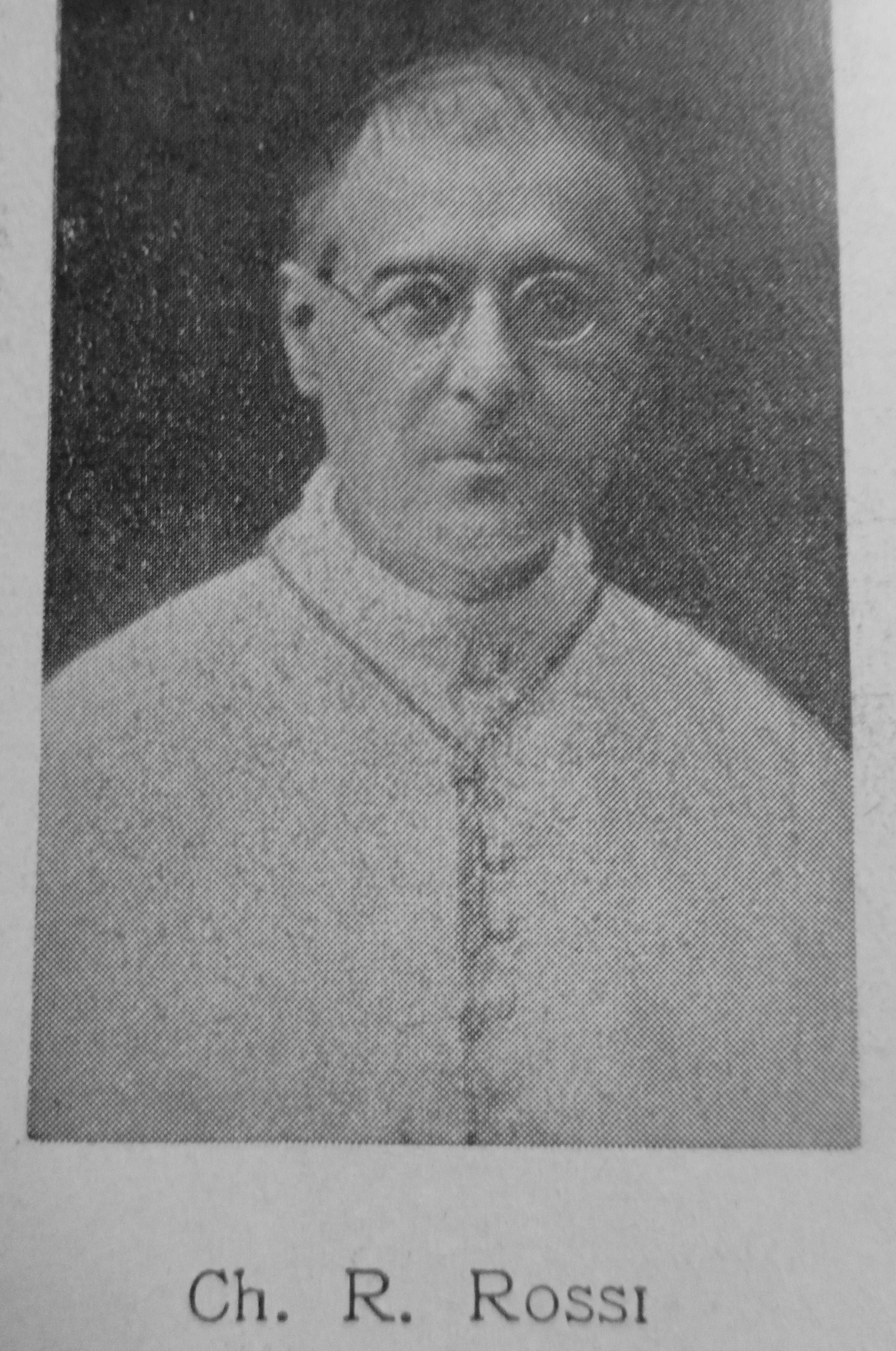 Photographie du cardinal Rossi parue dans L'Illustration, hors série de février 1939 consacré à la mort de Pie XI.